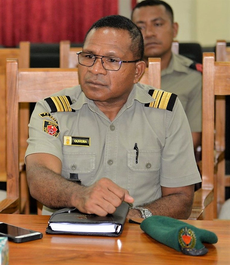 Kapitänleutnant Guido de Oliveira, Chef des medizinischen Dienstes.